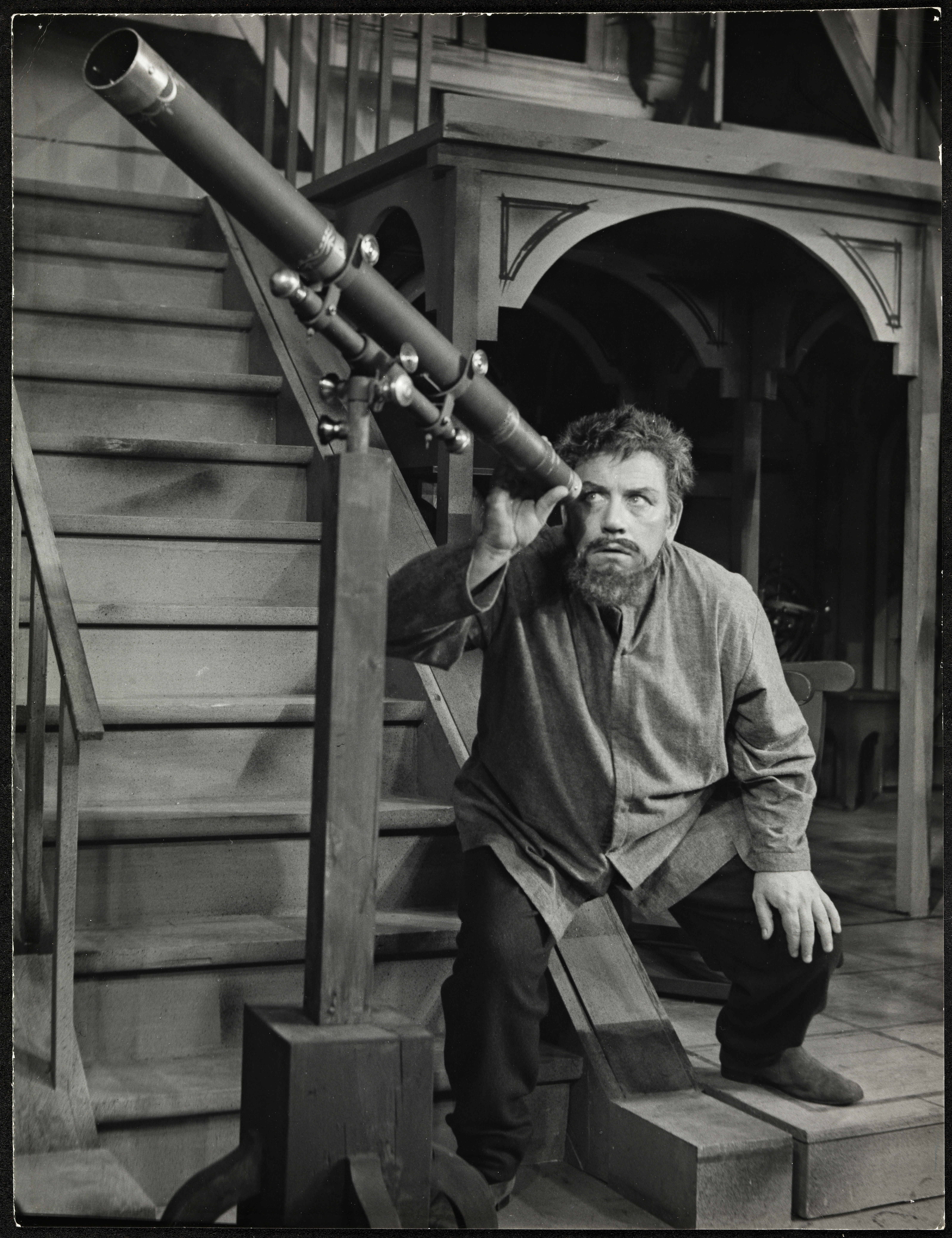 Beskrivelse / Description: Galileis liv er skrevet av Bertolt Brecht. Dato / Date: 1960 Sted / Place: Danmark, Odense Fotograf / Photographer: ukjent/unknown Digital kopi av original / Digital copy of original: sv/hv papirpositiv Eier / Owner Institution: Nasjonalbiblioteket / National Library of Norway Lenke / Link: Bildesignatur / Image Number: blds_08919